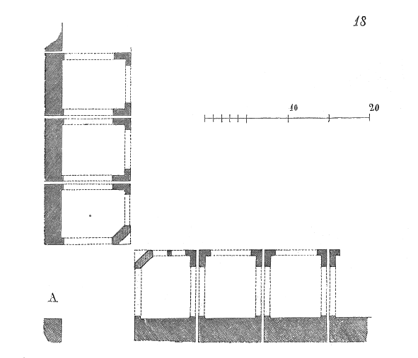 ... Établir la circulation sur les côtés d'une place et laisser le milieu en dehors de cette circulation a toujours été la préoccupation des planteurs de villes du moyen âge. Des pans coupés, ménagés aux retours d'équerre des maisons d'angle, permettent aux chariots d'entrer dans la place facilement les jours de marché. Nous présentons (18) le plan d'un quart de la place de la bastide de Montpazier, et (19) la vue perspective d'une des entrées de cette place prise du point A du plan. On voit dans cette figure comment les angles des maisons sont portés en encorbellement au-dessus des larges pans coupés qui donnent entrée diagonalement sur la place ...